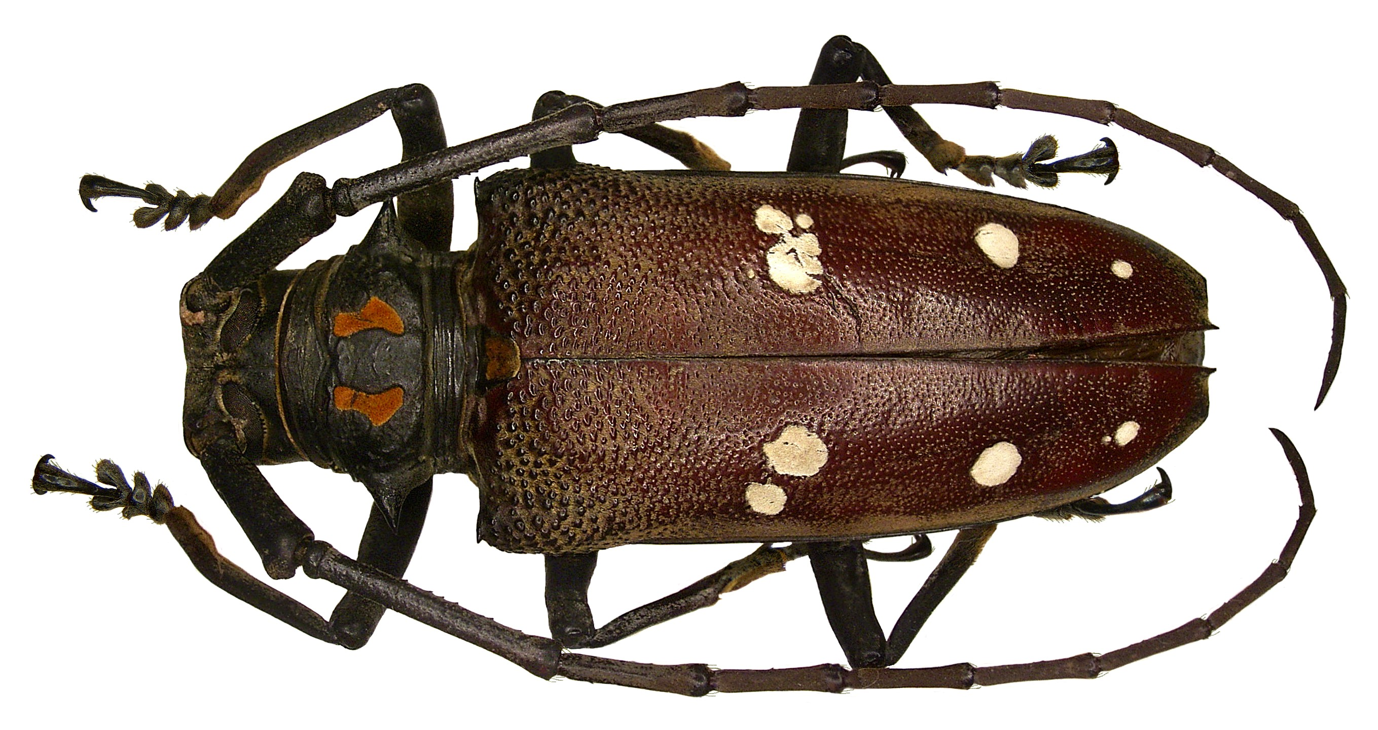 Familie: Cerambycidae Grösse: 26-49 mm Verbreitung: Philippinen Fundort: Philippinen, Leyte, Balocane det. A.Skale, 2006 Foto: U.Schmidt, 2008